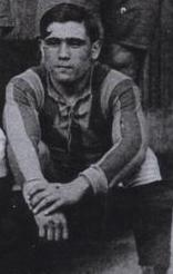 Antonio "El Petiso" Miguel con la camiseta de Rosario Central en 1928.